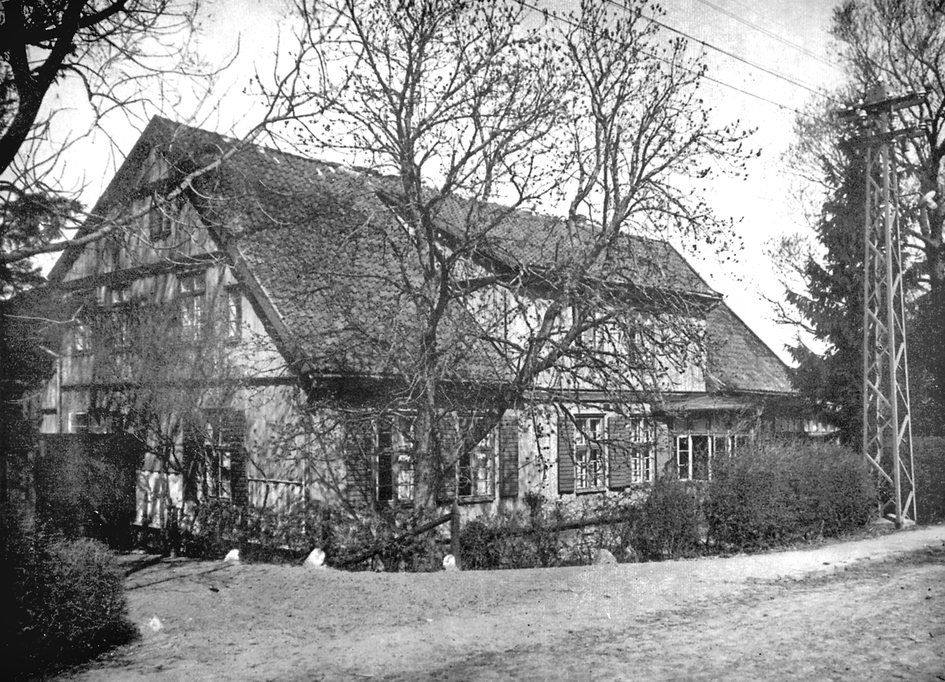 Geburtshaus der Dichterin Charlotte Keyser (1890-1966)